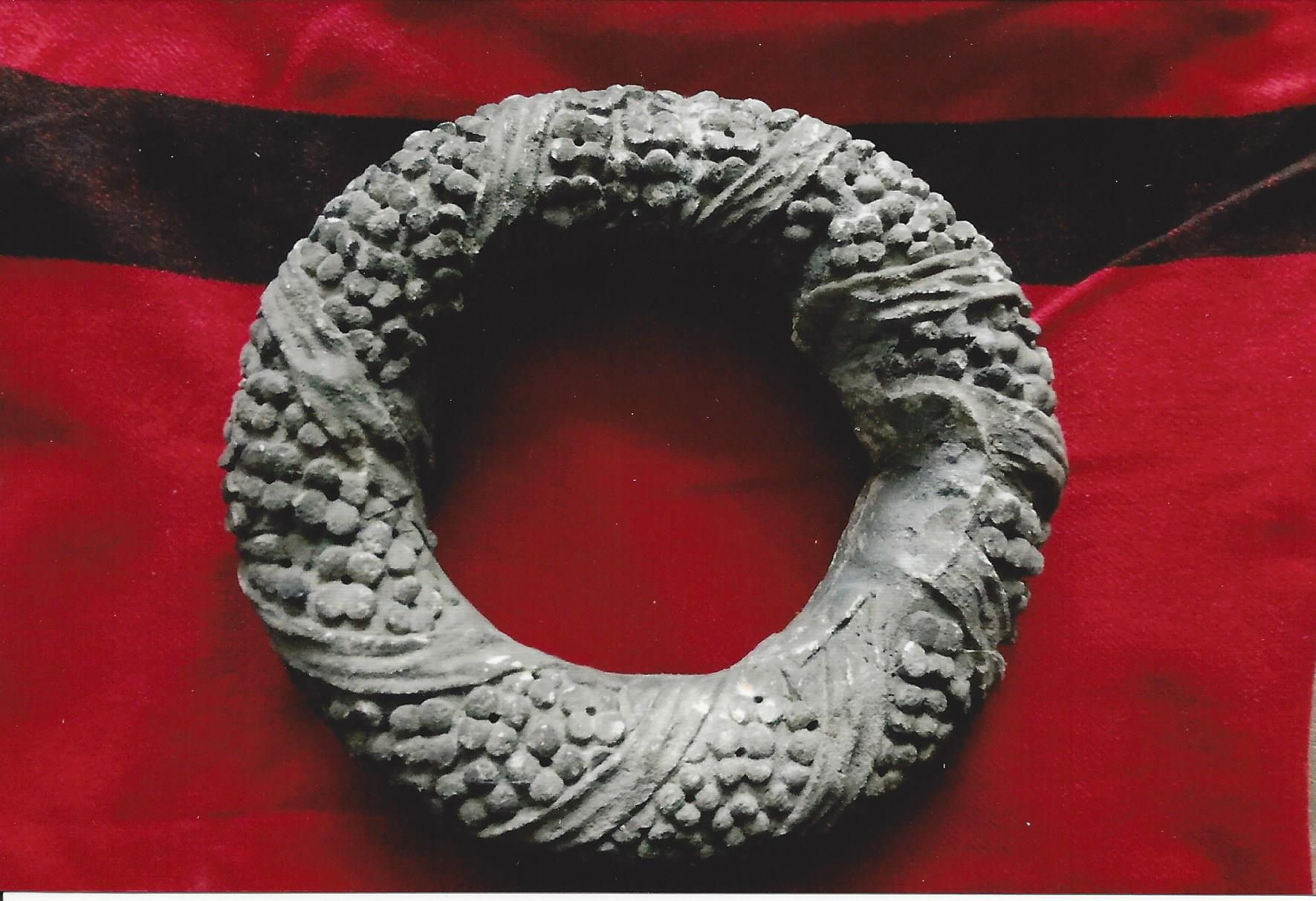 Kranz, Sandstein (Pirna), 1872, vom Kriegerdenkmal auf der Rudelsburg bei Bad Kösen; Durchmesser ca. 35 cm, Kranzbreite ca. 8 cm